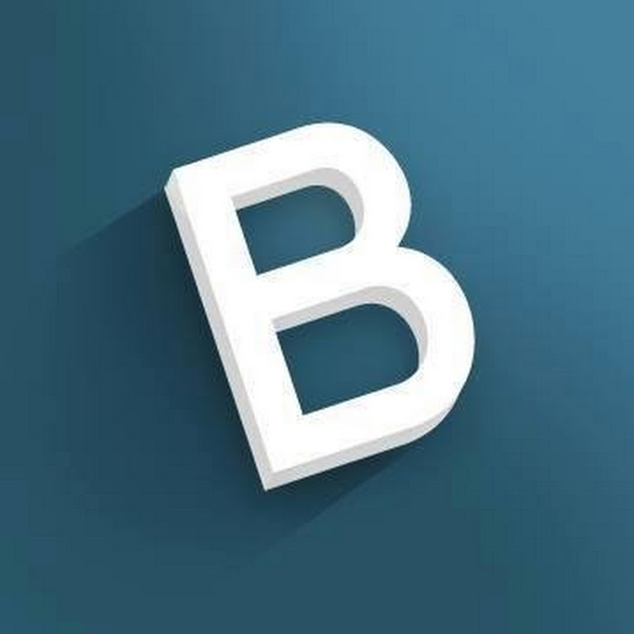 badabun un canal de youtubers mexicanos muy conocido por varios episodios de exponiendo infieles